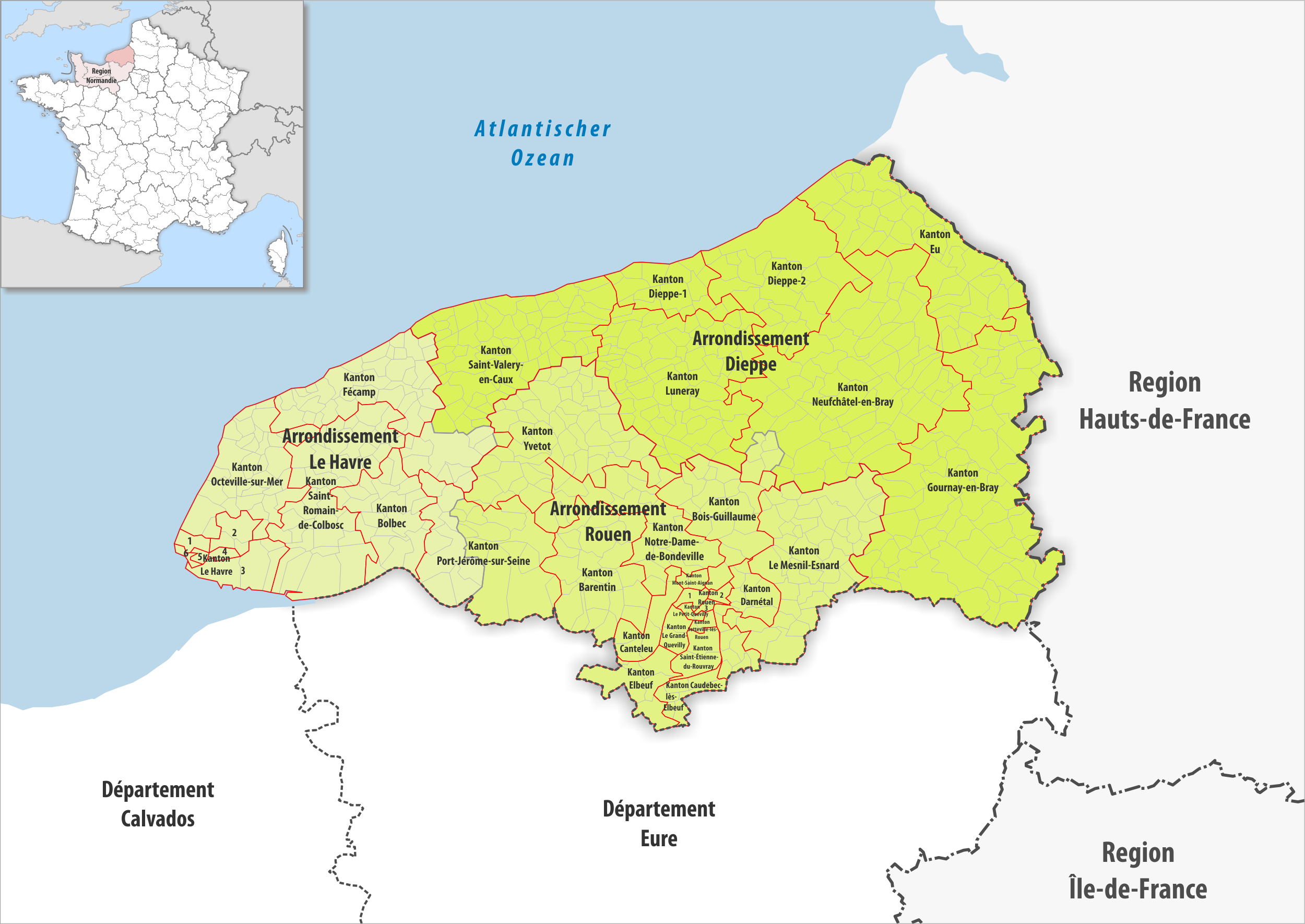 Gemeinden, Kantone und Arrondissemente im Departement Seine-Maritime